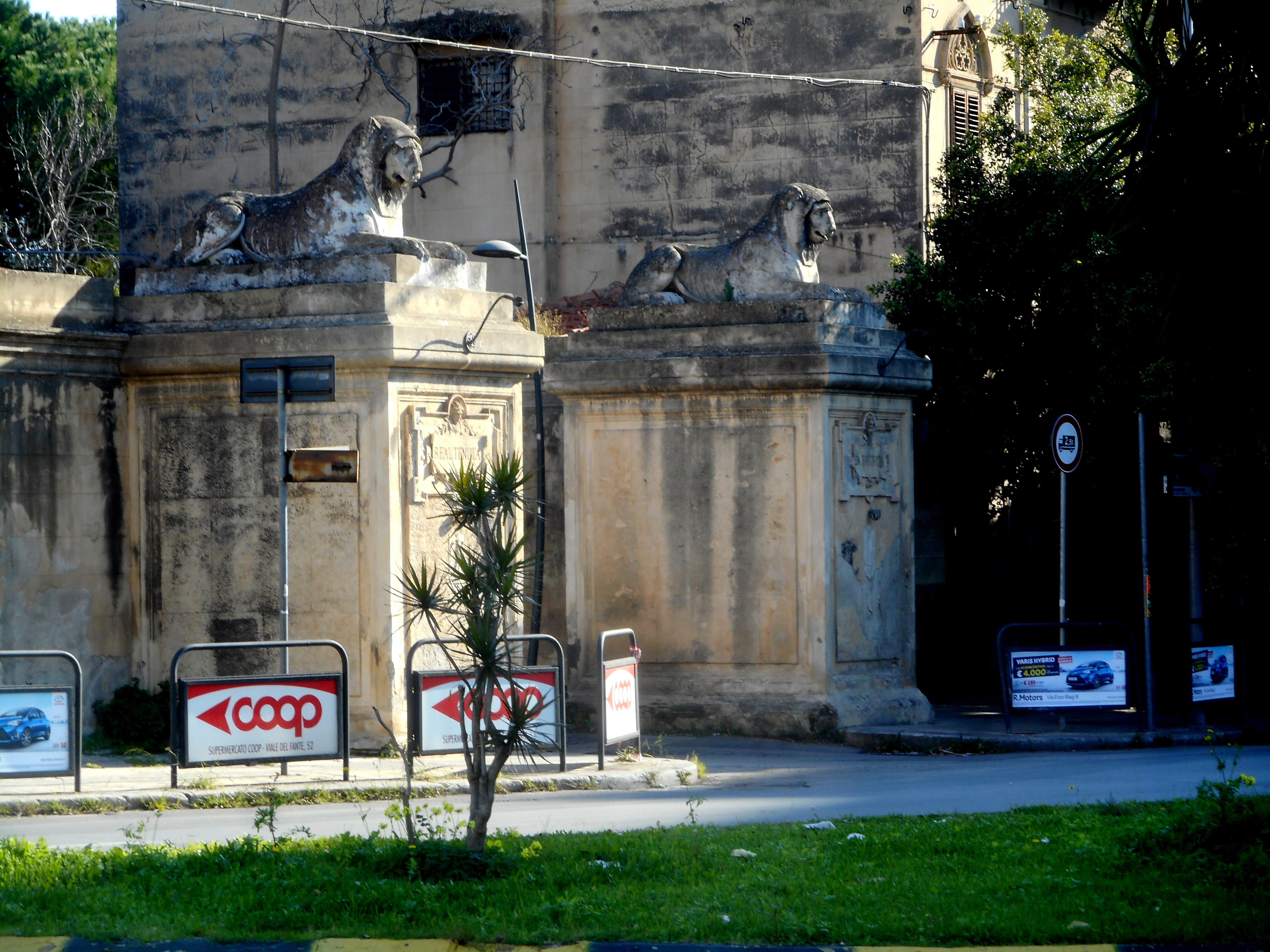 Porta dei Leoni, ingresso principale del Parco della Favorita